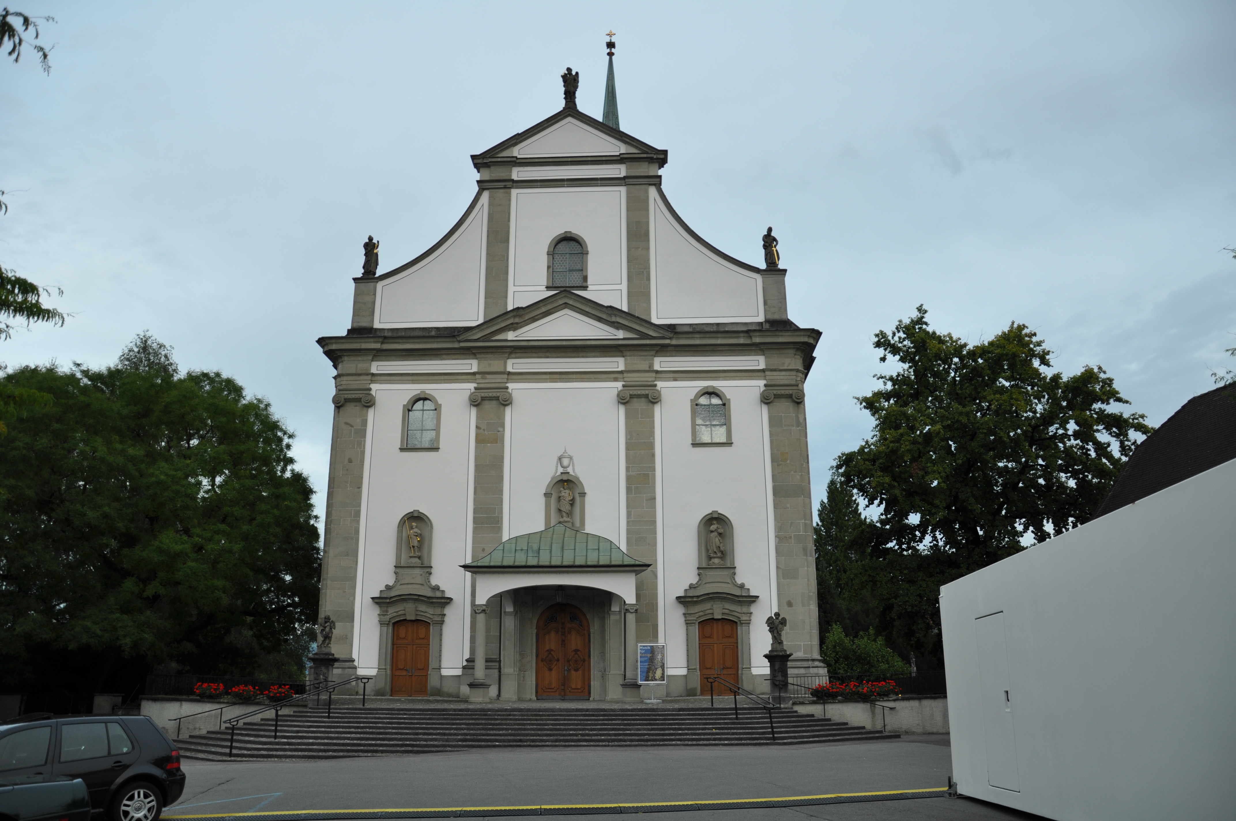 Cham: Katholische Kirche St. Jakob